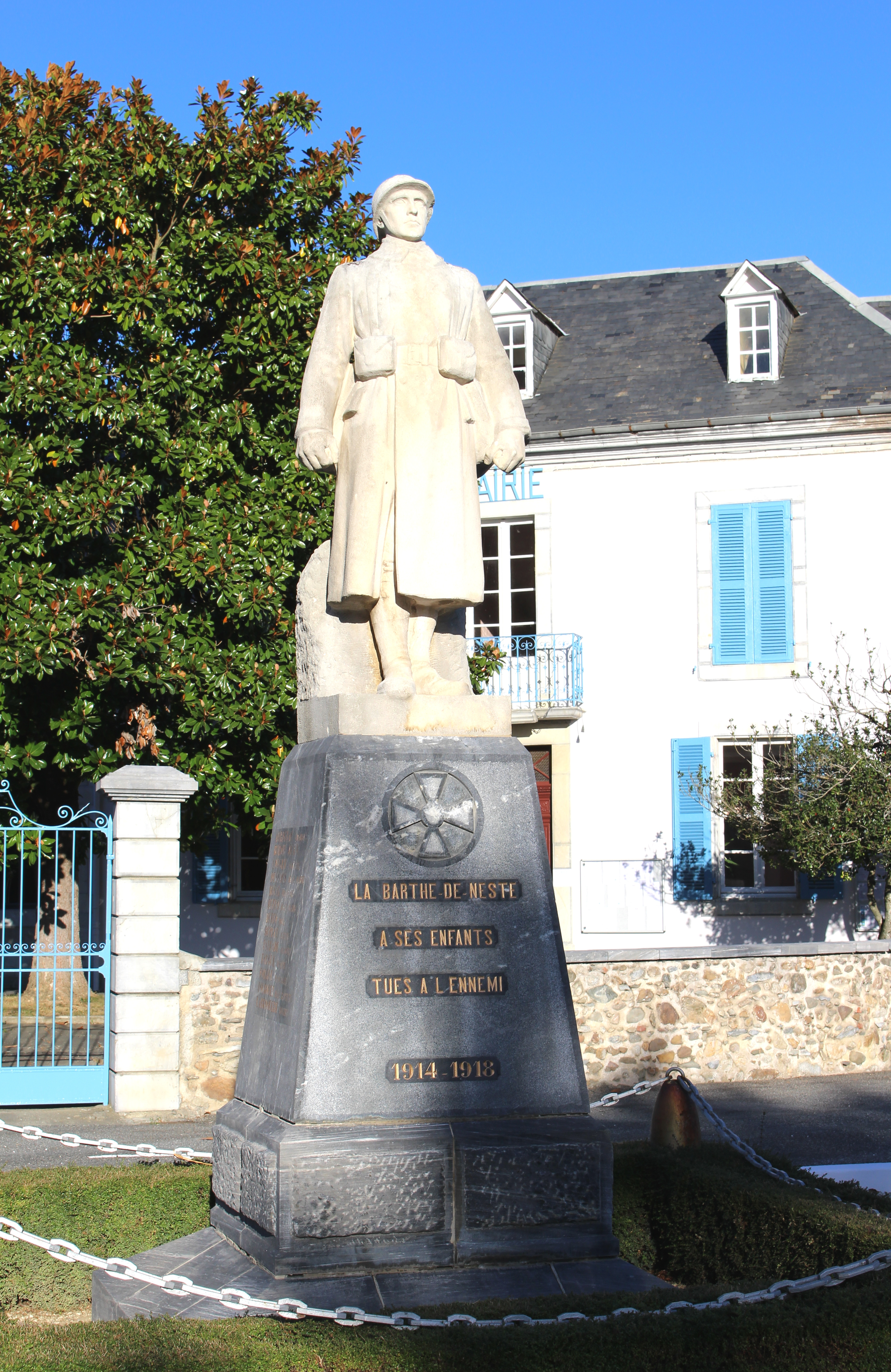 Monument aux morts de La Barthe-de-Neste (Hautes-Pyrénées)